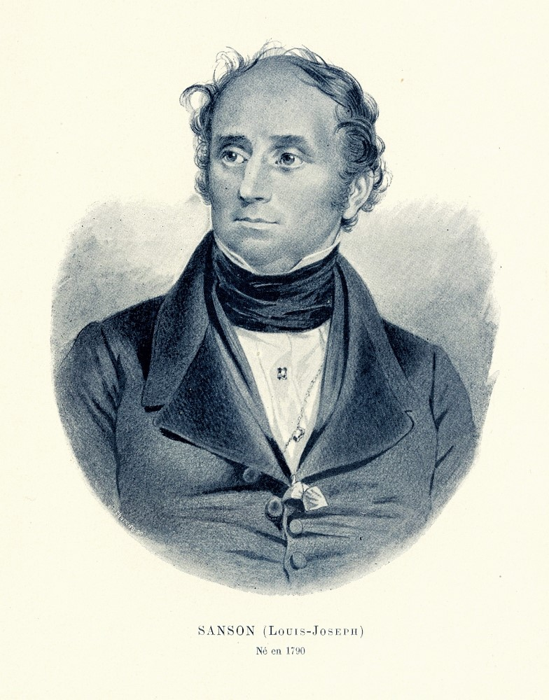 Lithographie d'après N. E. Maurin. Auteur de l'ouvrage : Corlieu (A.) Ouvrage : Centenaire de la Faculté de Médecine de Paris (1794-1894) Edition : Paris : F. Alcan, 1894